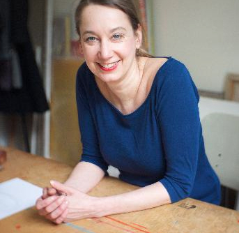 Das Portrait von Lela Erlenwein